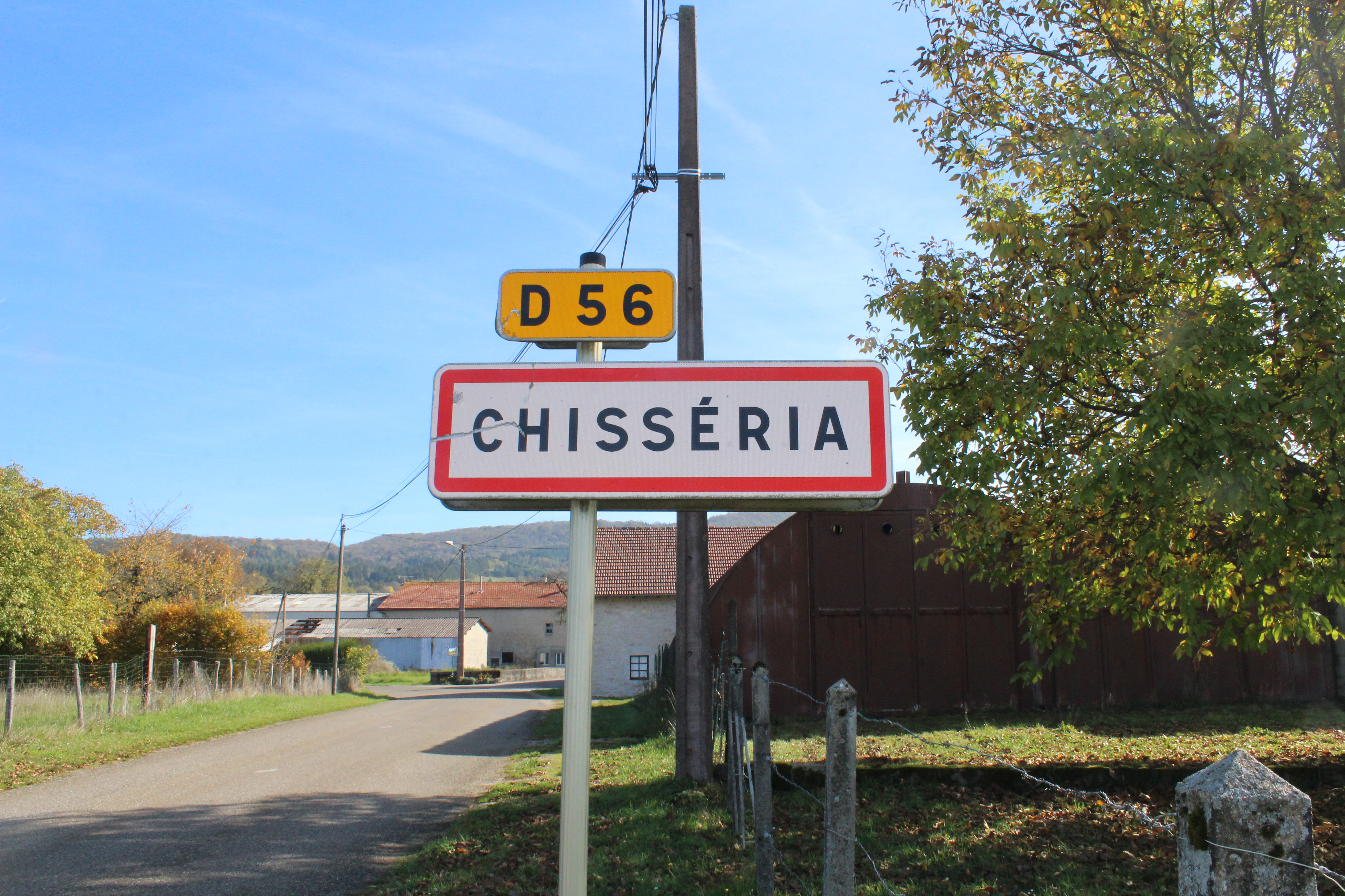 Panneau d'entrée dans Chisséria.